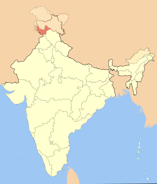 Credit: User:Deepak